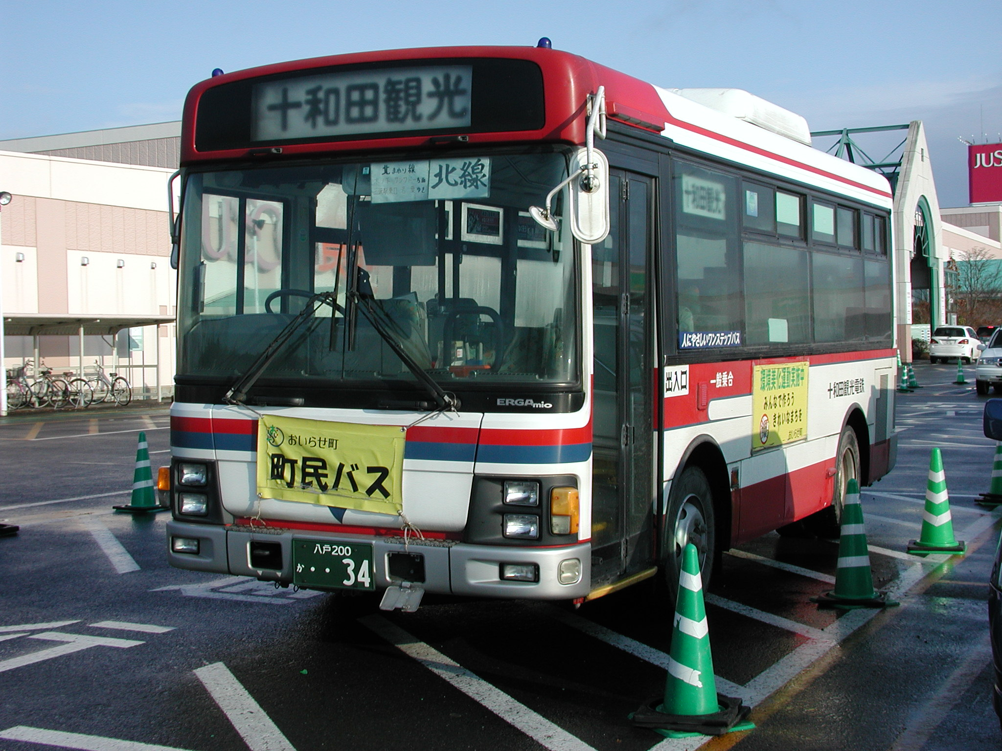 十和田観光電鉄バス 一般路線塗色：オリジナルカラー（いすゞ・エルガミオ7mBUS：KK-LR233E1）：おいらせ町民バス運用 イオンモール下田：ジャスコ食品館前バスのりばにて